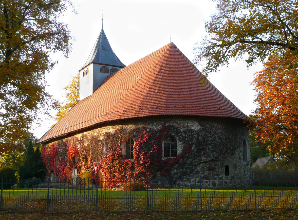 Feldsteinkirche Trebel